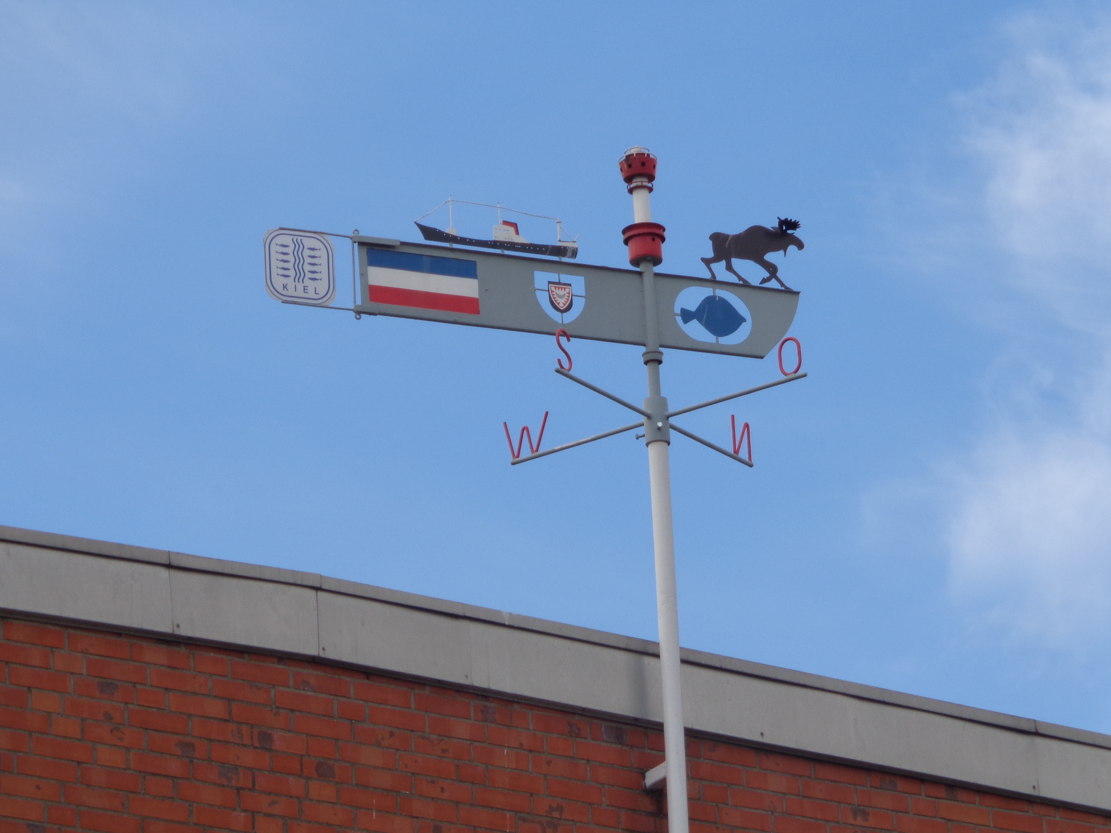 Windfahne über der Osteinfahrt der Markthalle in Wellingdorf